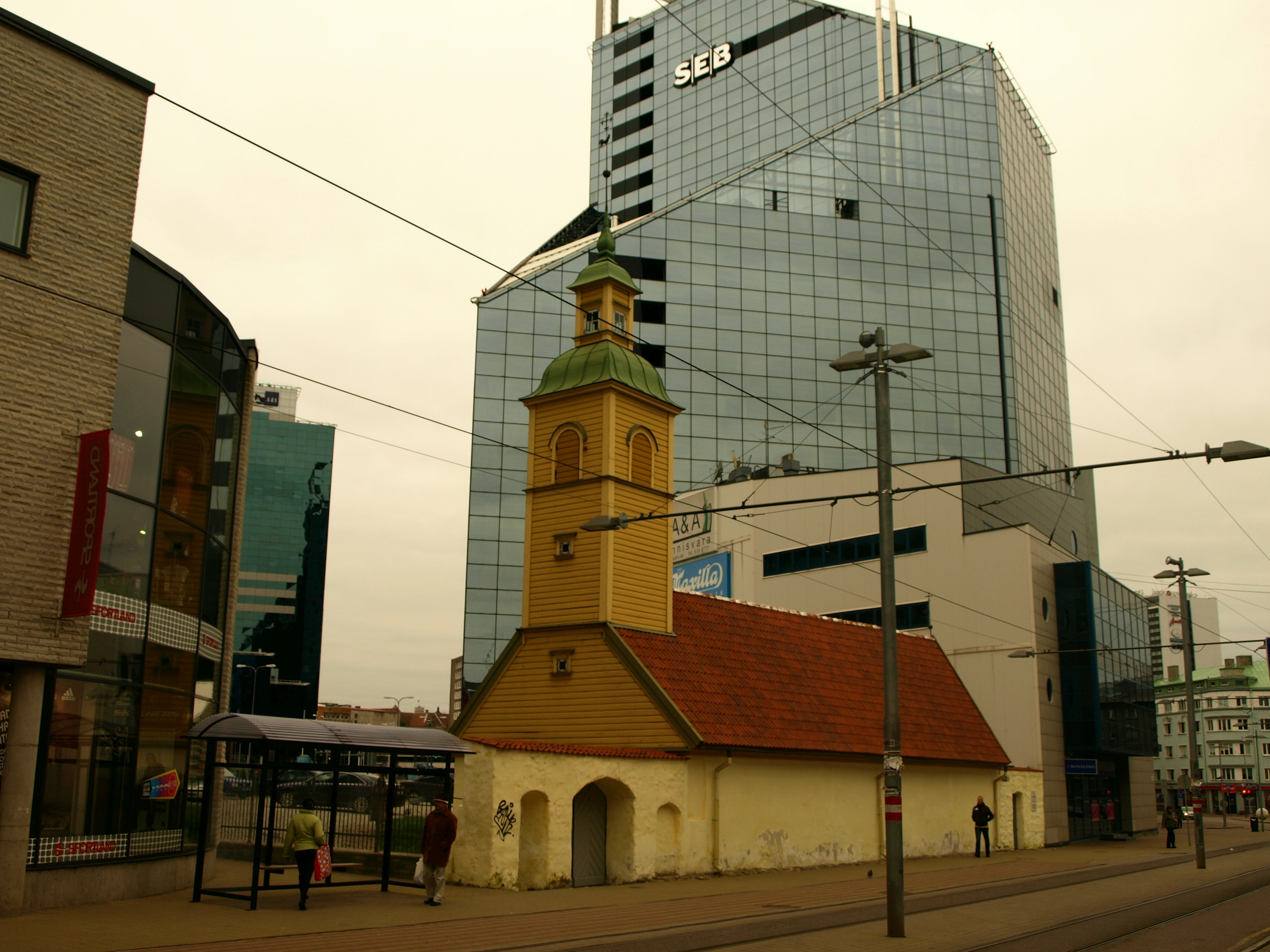 Tallinna Jaani Seegi kirik